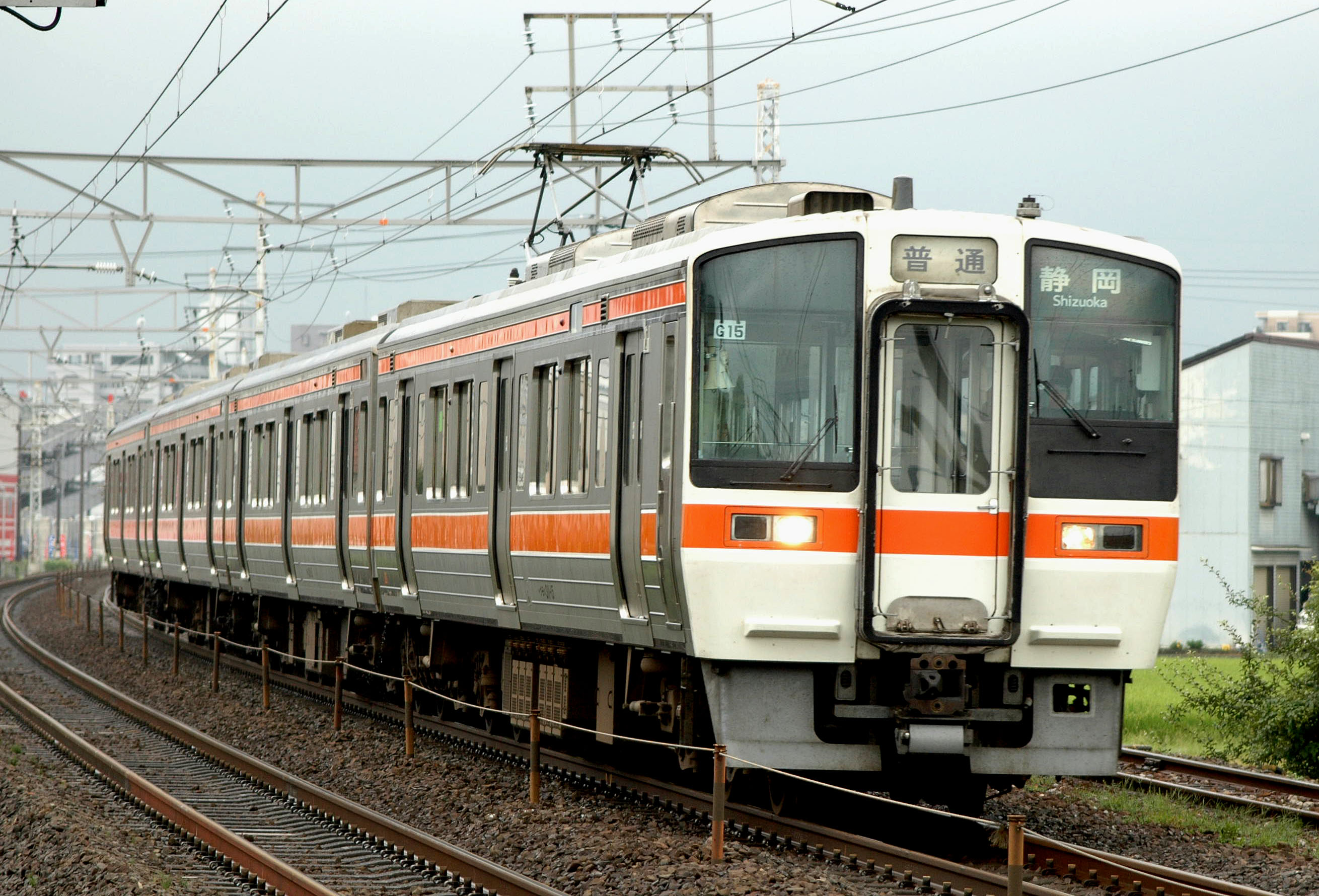 JR Central 311 series electric multiple units. JR東海311系近郊型電車。大垣-穂積間にて。